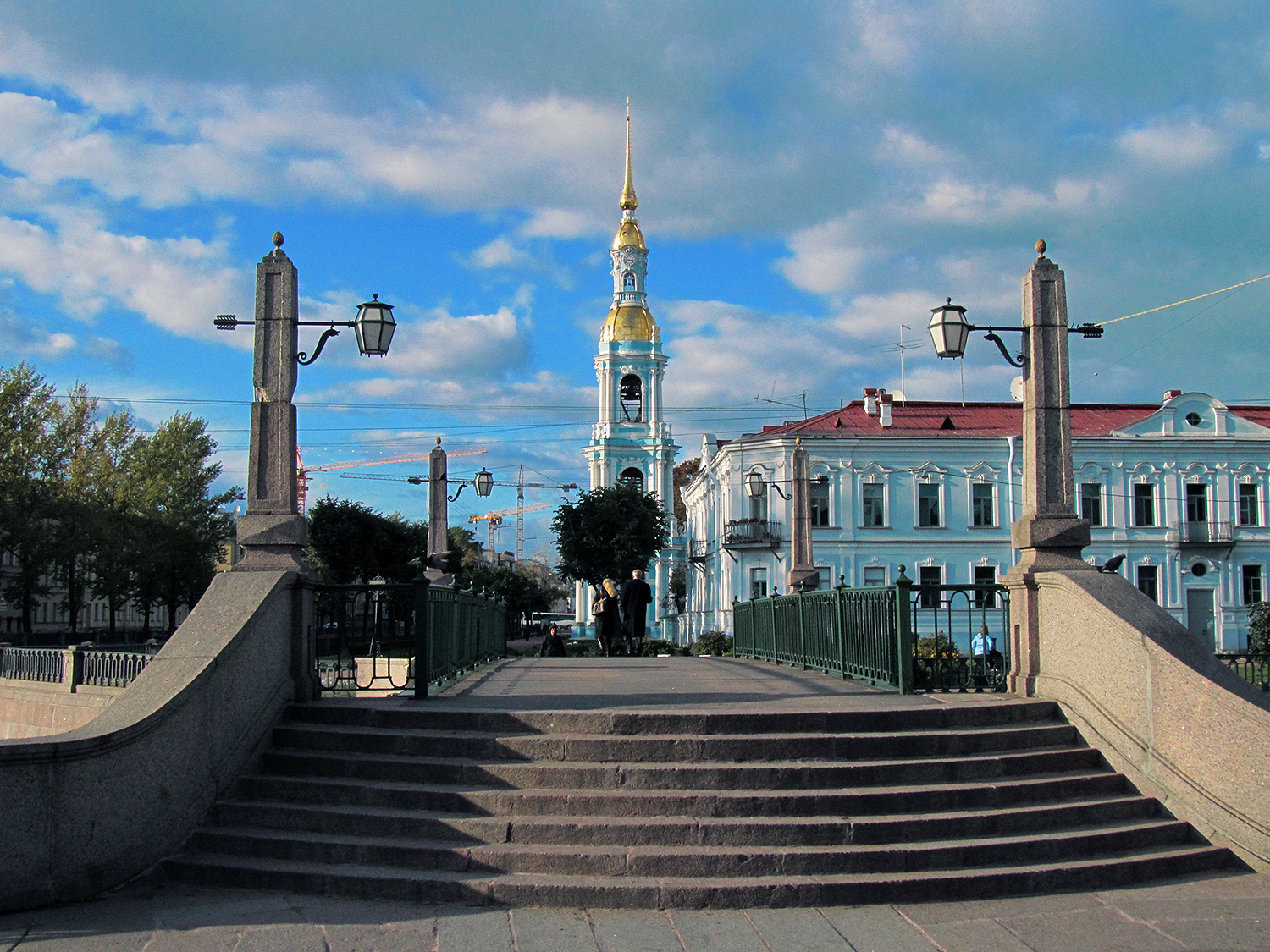 Колокольня Николо-Богоявленского собора.1756-1759 гг., арх. Чевакинский С. И. Никольский морской собор (официальное название Морской собор Святителя Николая Чудотворца и Богоявления) — православный храм в Санкт-Петербурге на Никольской площади. К западу от храма возводится колокольня. Ее построили в 1758 году, раньше церкви. Архитектор предвидел продление канала, и в 1780-ые годы колокольня оказалась стоящей на берегу. Чевакинский был учеником Ф.Растрелли и нереализованный план учителя отразился на архитектуре колокольни, пусть и в меньшем масштабе. (Растрелли мечтал построить пятиярусную колокольню высотой 140 метров). В 2000 году в нижнем ярусе колокольни освящена часовня.